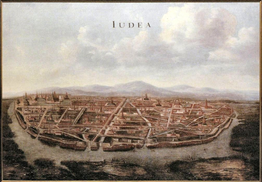 foto van schilderij in de VOC-kamer van het bushuis (voormalig VOC-huis)